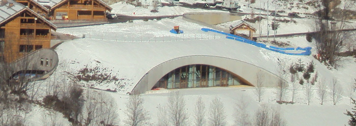 Le village de Vaujany vu depuis le versant opposé.